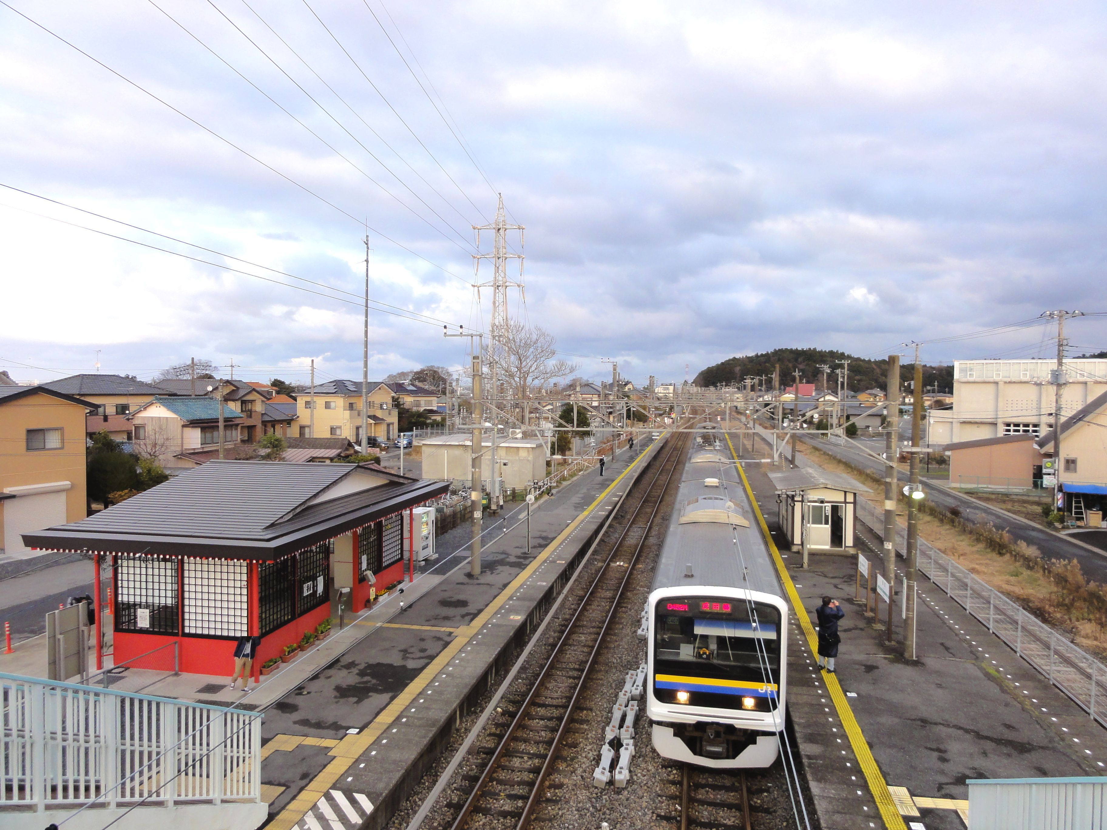 香取駅ホーム